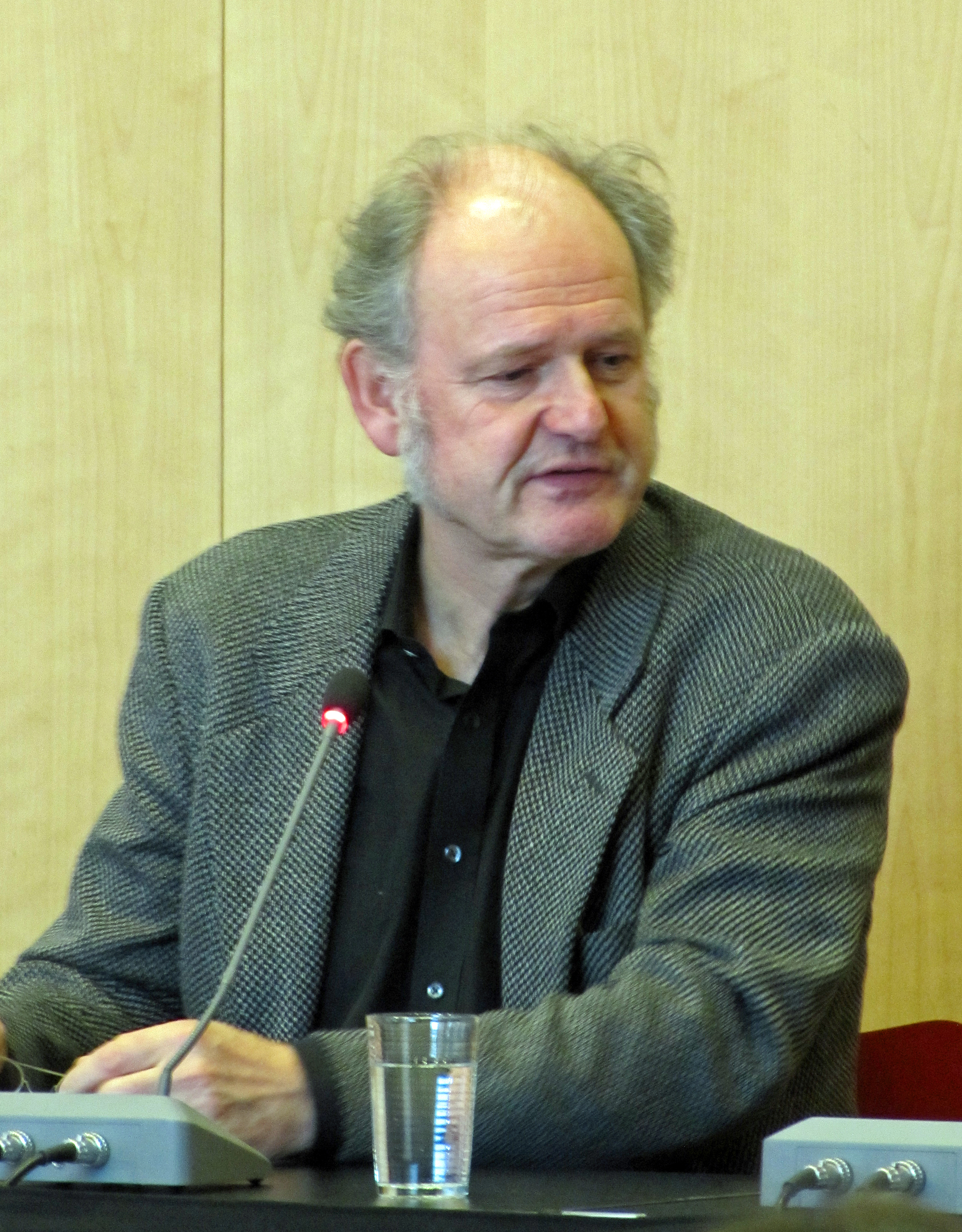 Michael Quast stellt Philipp Mosetter und sein neues Buch: "Kurt. Die Legende unter den Ikonen", am 16. Februar, im Haus am Dom, in Frankfurt am Main, vor.